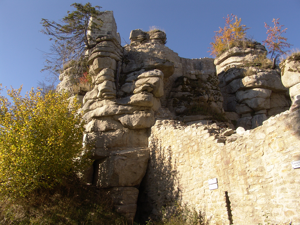 Ruine Weißenstein im Steinwald von Süden aus gesehen